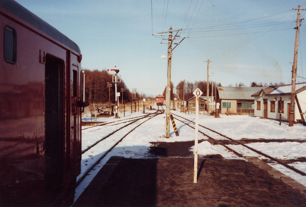 標津線西春別駅での列車交換風景 ネガプリントよりスキャン